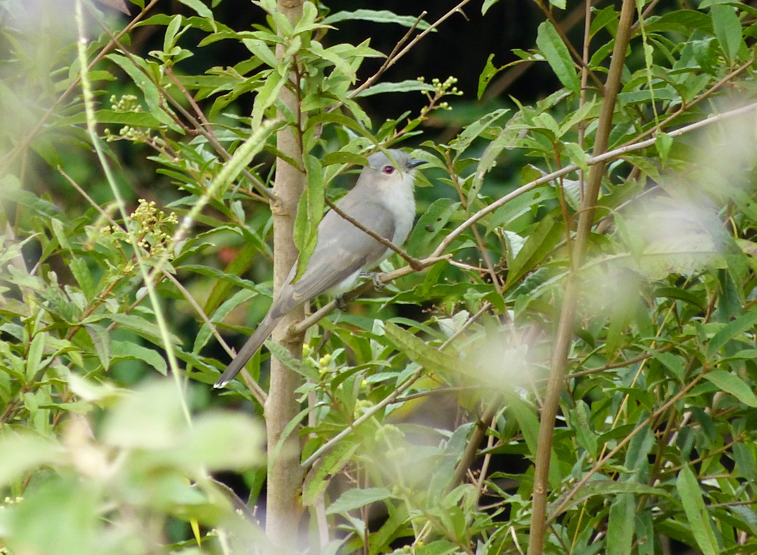 Foto do Papa-lagarta-cinzento, tirada em Rio Verde - GO, em 23 de abril de 2013, por Fábio Rocha Pina.